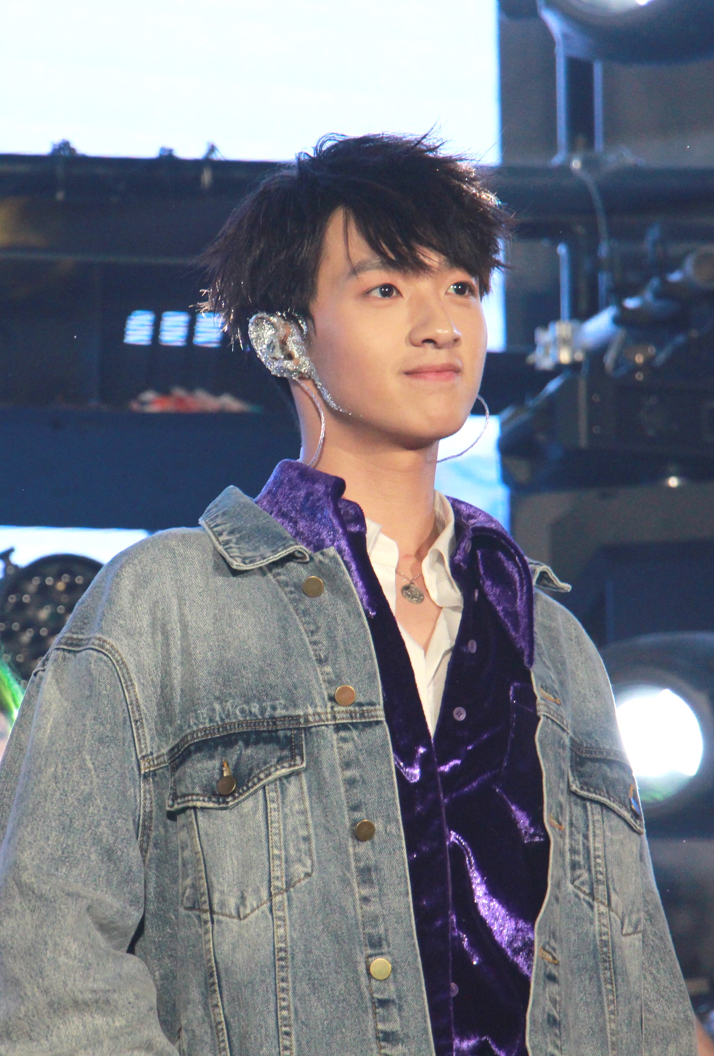 Ngô Quý Phong Starry Show